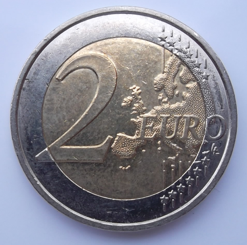 Pièce commémorative de 2 euros (pile): commémoration du 30e anniversaire de la Fête de la Musique, 24 de junio 2011.